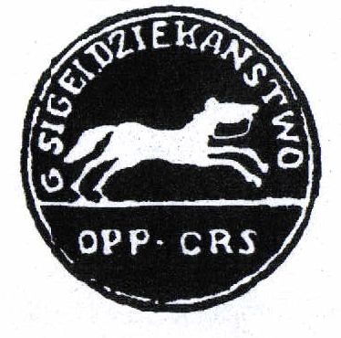 Dziekaństwo - pieczątka gminna